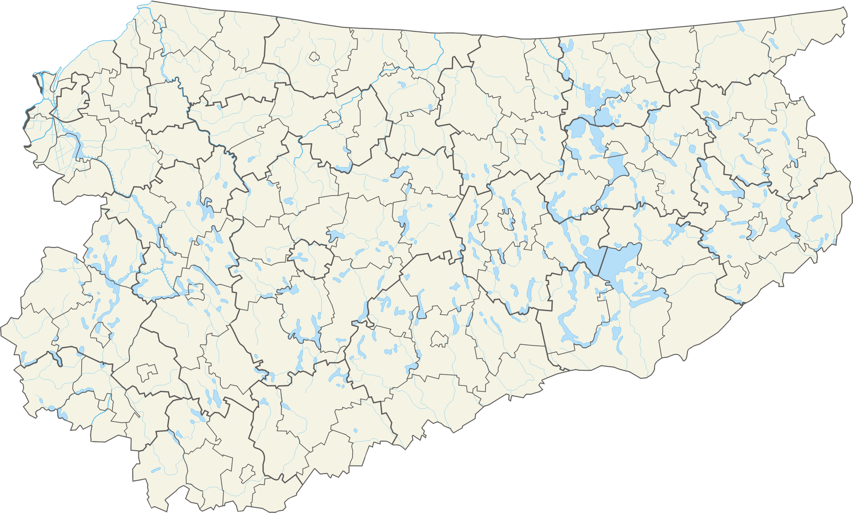 Województwo warmińsko-mazurskie – powiaty i gminy Współrzędne graniczne mapy: N: 54.4424° N S: 53.1407° N W: 19.1280° E E: 22.7856° E